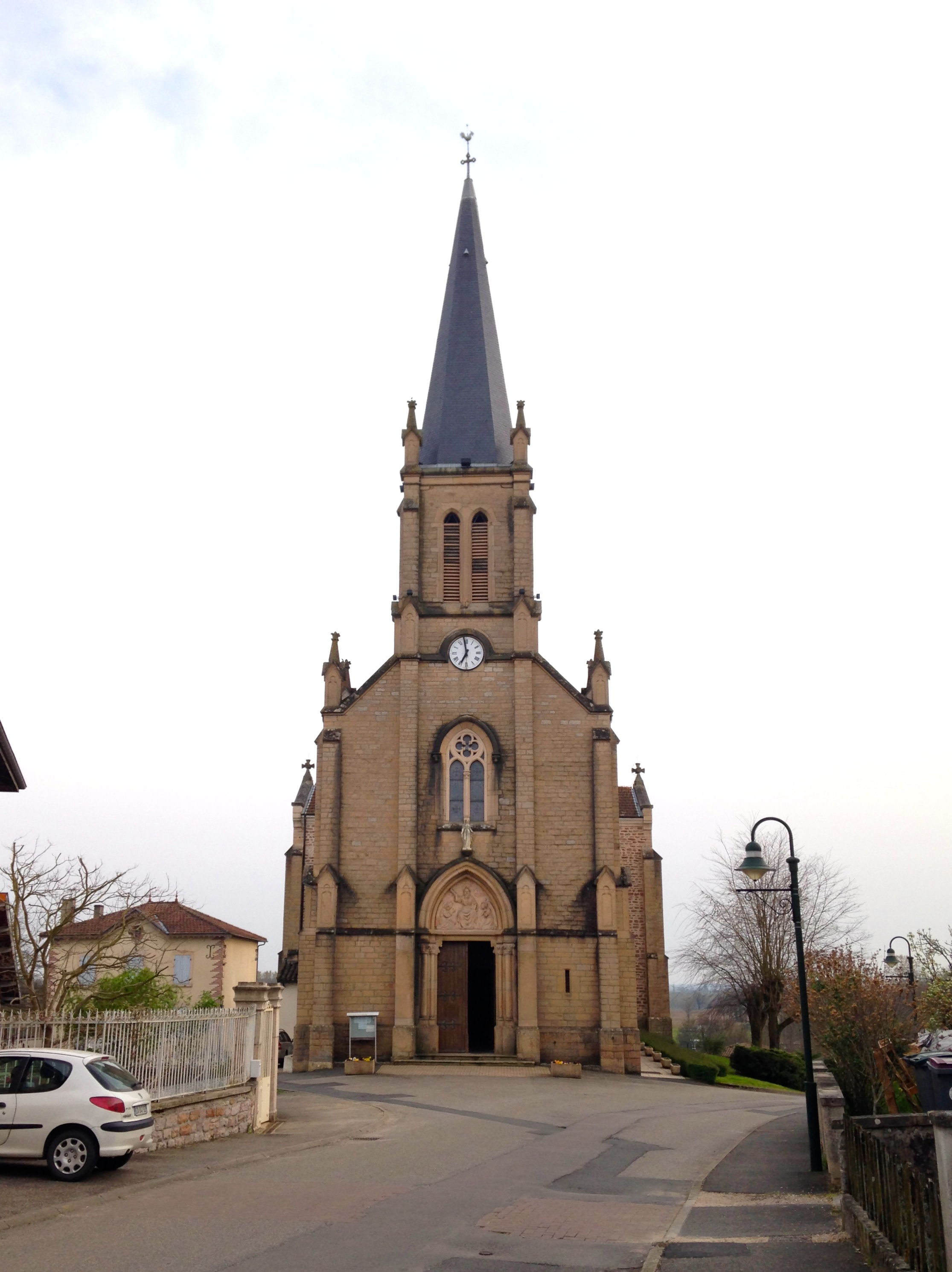 L'Église du village de Saint-Cyr-sur-Menthon